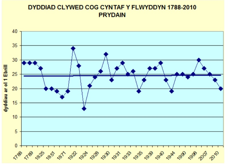 Graff yn dangos ‘dyddiadau cyntaf’ clywed y gog o 1788 i’r presennol o amrywiol gofnodion (Cymreig gan mwyaf)